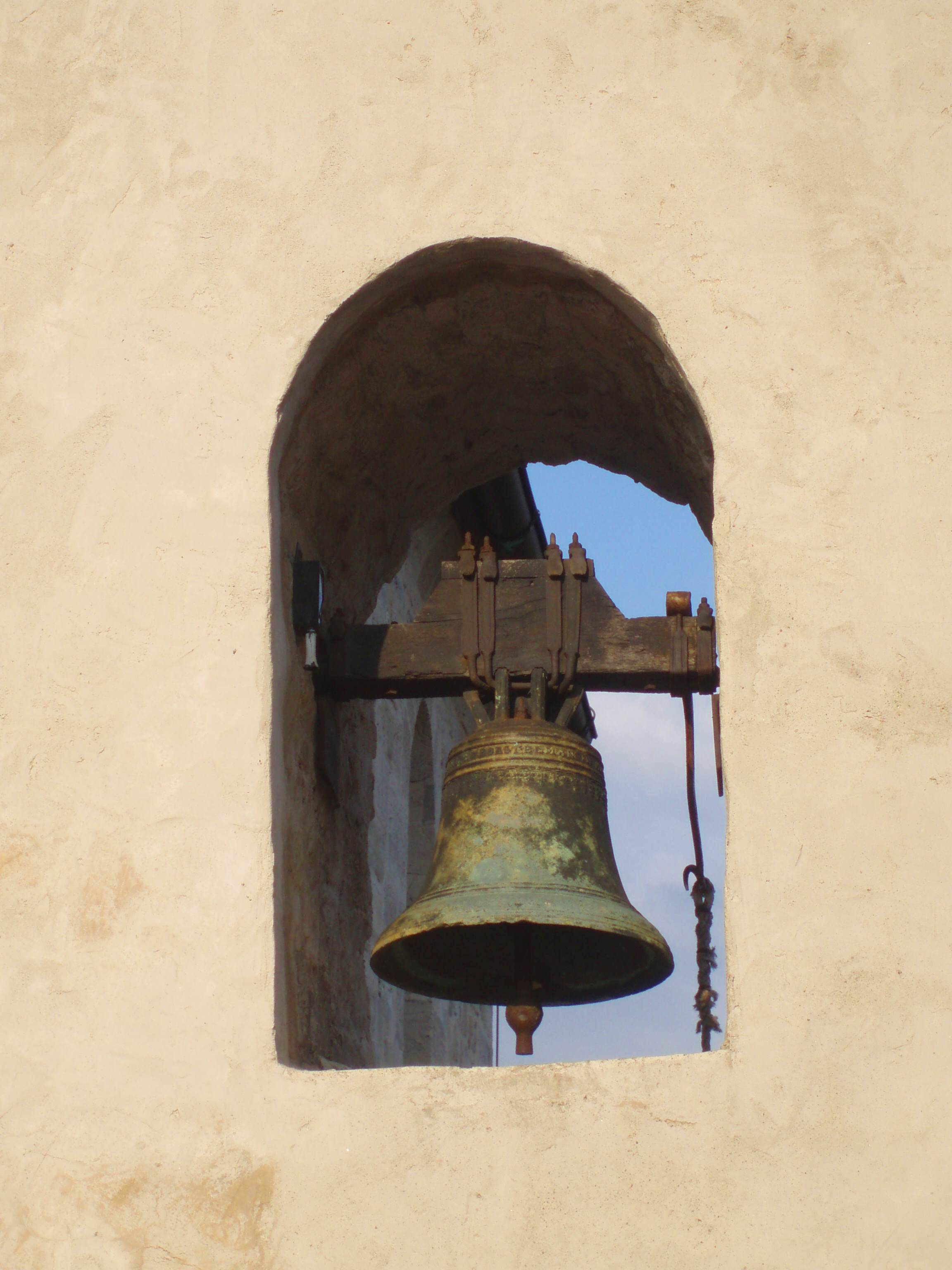 Glocke Konradsburg